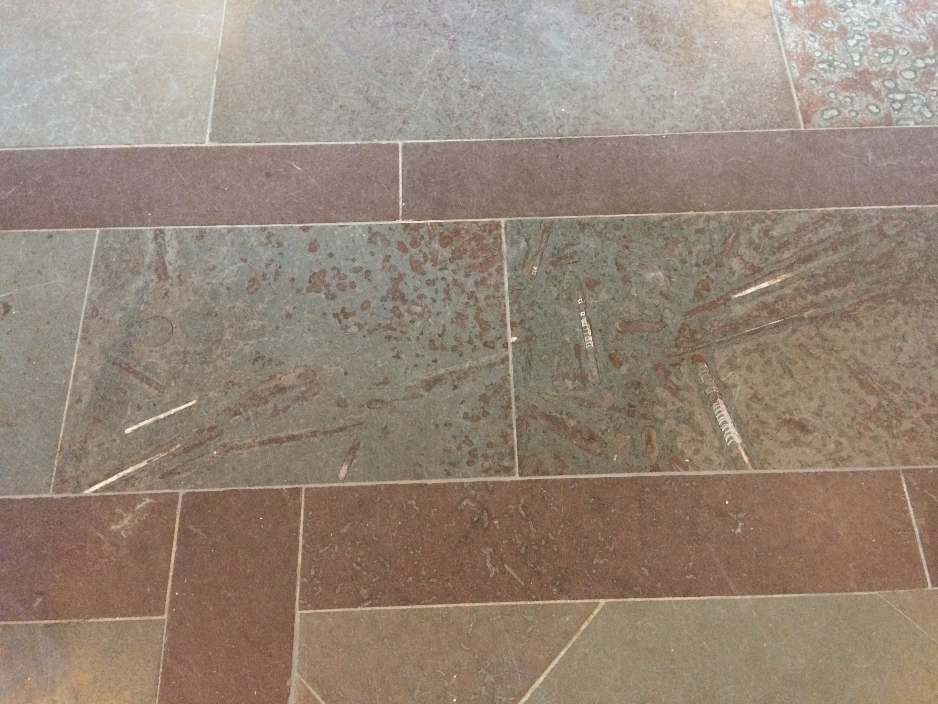 Flisegulv af rød, grå og grøn ortoceratitkalk, midtskibs foran koret i Viborg domkirke